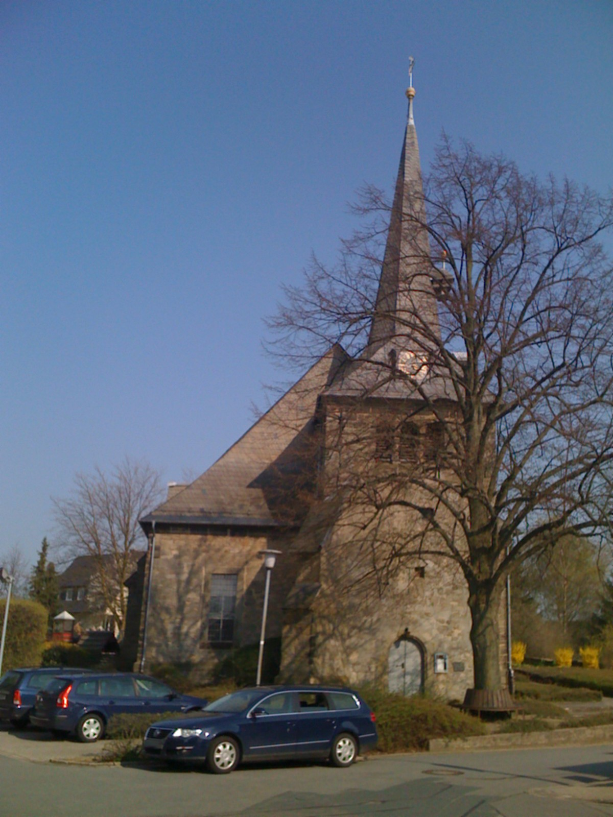 St. Andreaskirche in Langeslheim von Westen